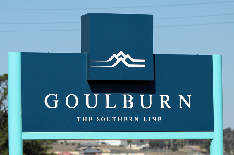 En stationsskylt på Goulburn station (Australien). Skylten har CountryLinks logotyp, stationens namn, samt linjenamnet och är väldigt typisk av countrylinkskyltar